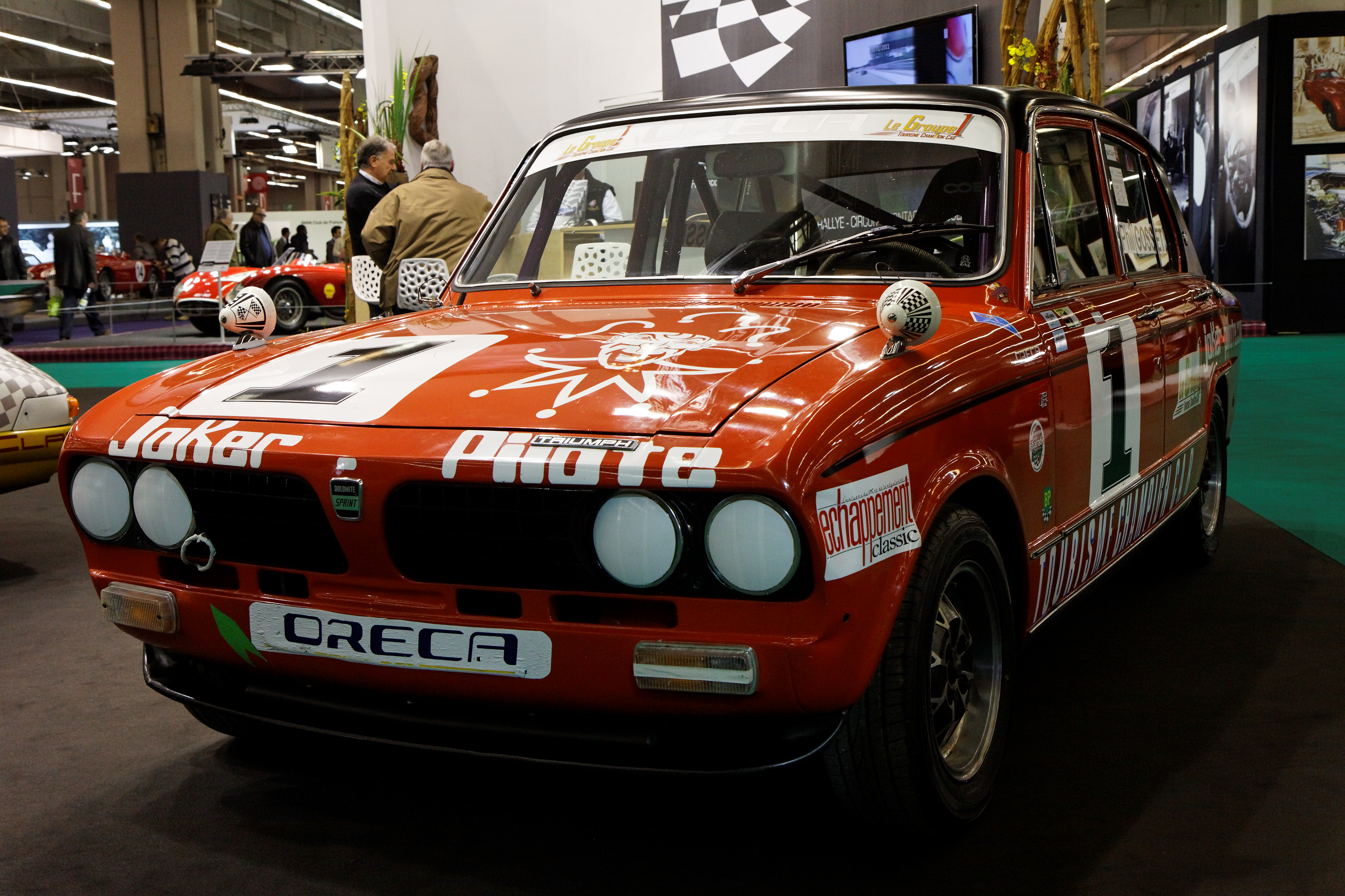 Photographie prise lors du salon rétromobile 2011 à Paris, porte de Versailles.